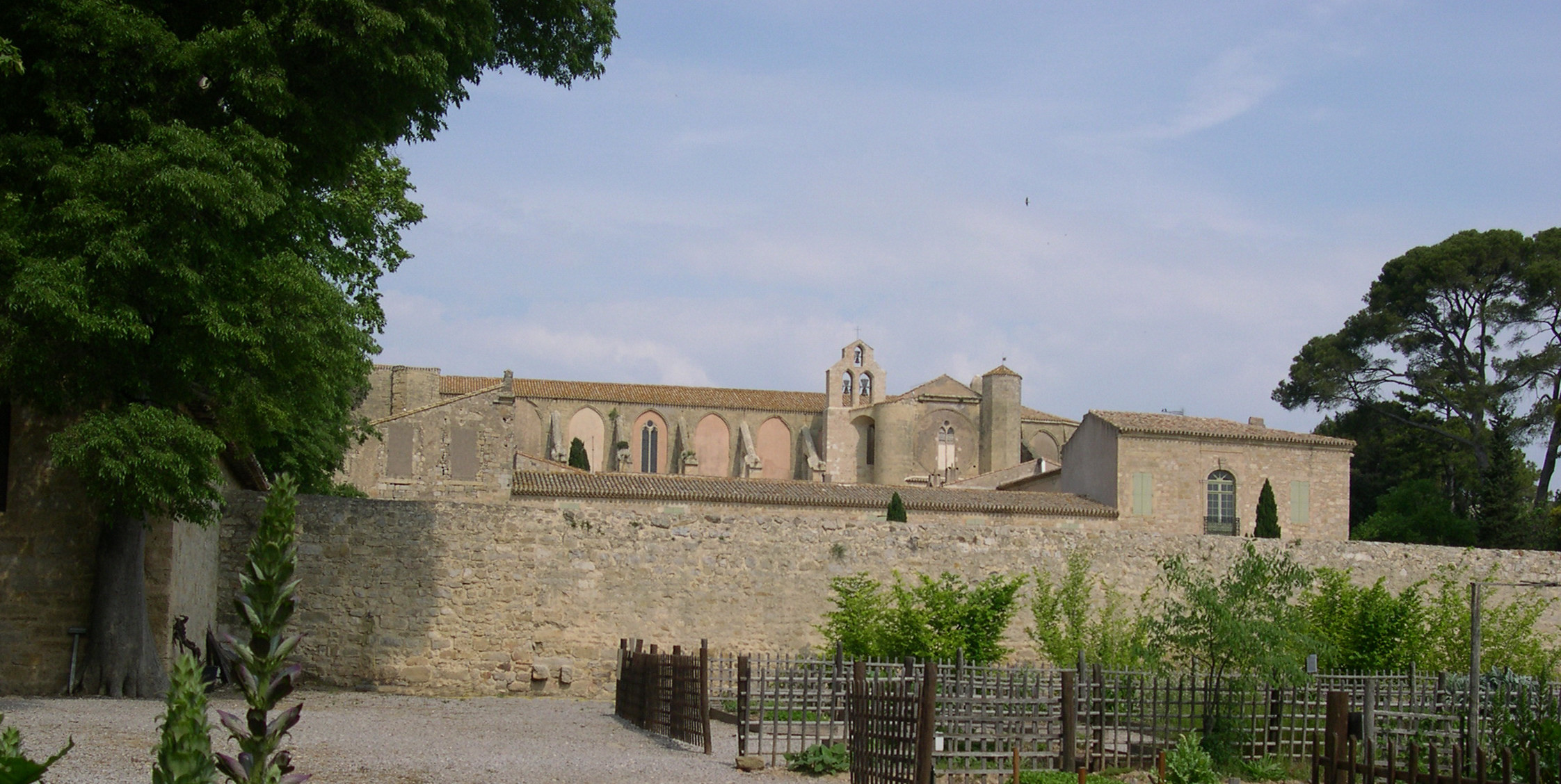 Abbaye de Valmagne (Villeveyrac - Hérault) - vue générale.